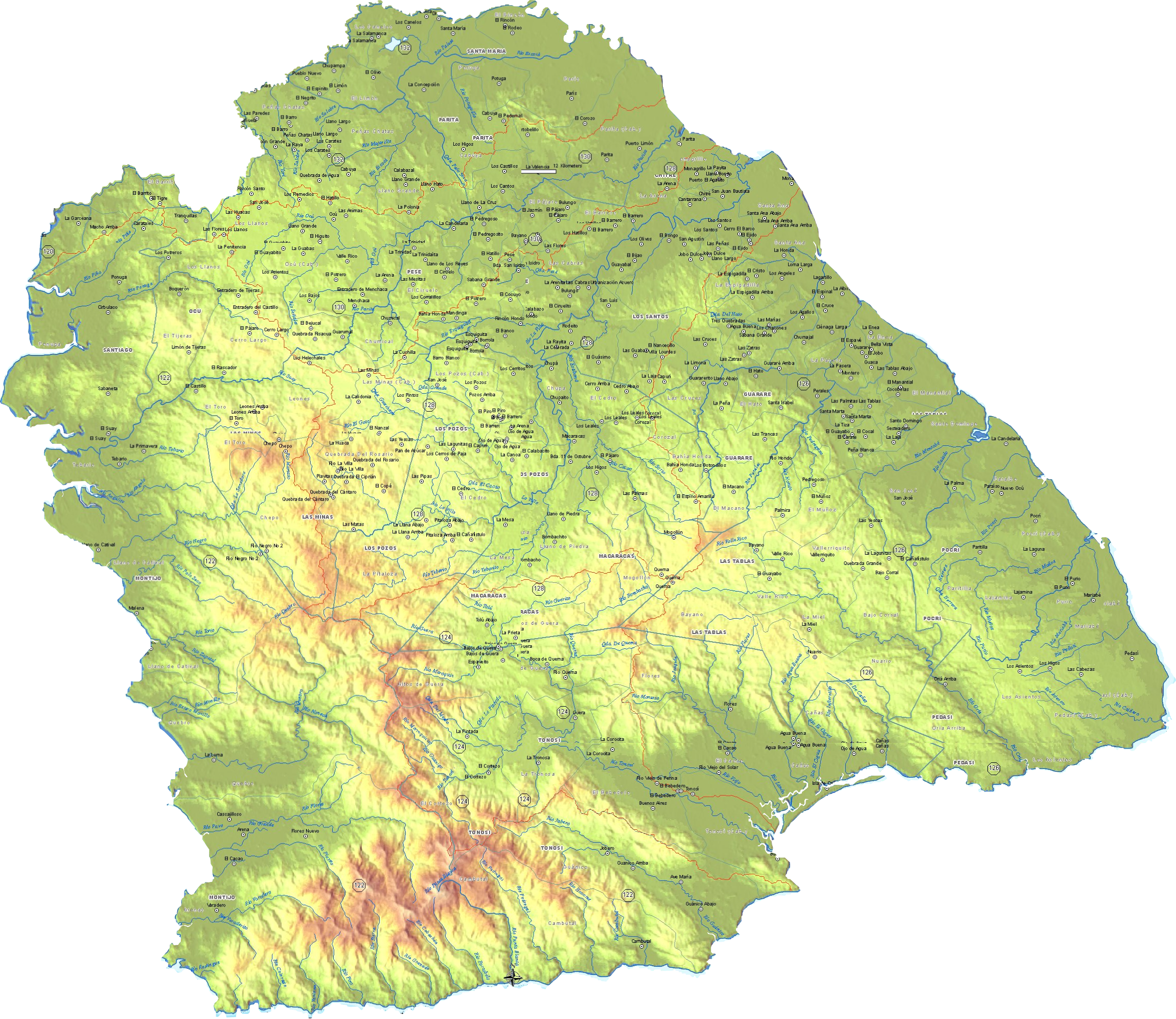 Extensión de la provincia de Los Santos sobre un mapa actual, como está descrito en el capítulo séptimo, artículo 38 de la Ley 103 de 1941